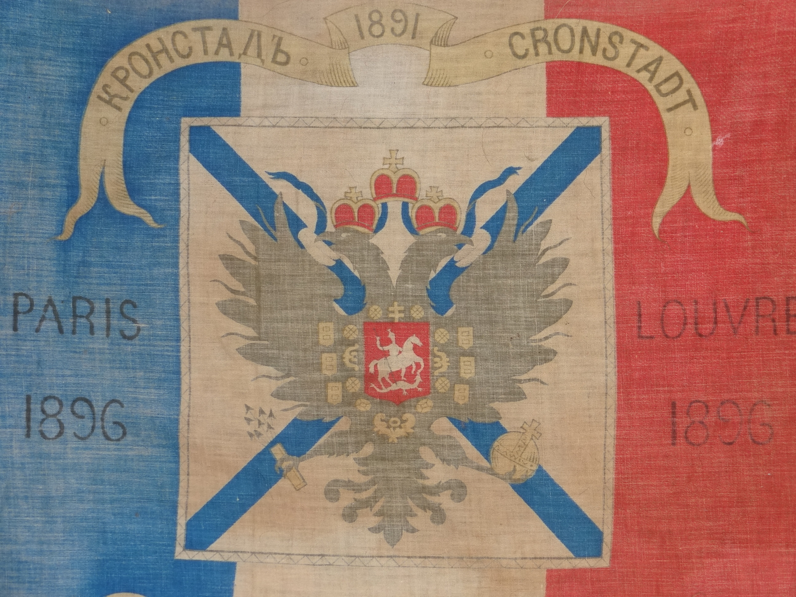 Pavillon naval commémoratif de l'alliance militaire franco-russe